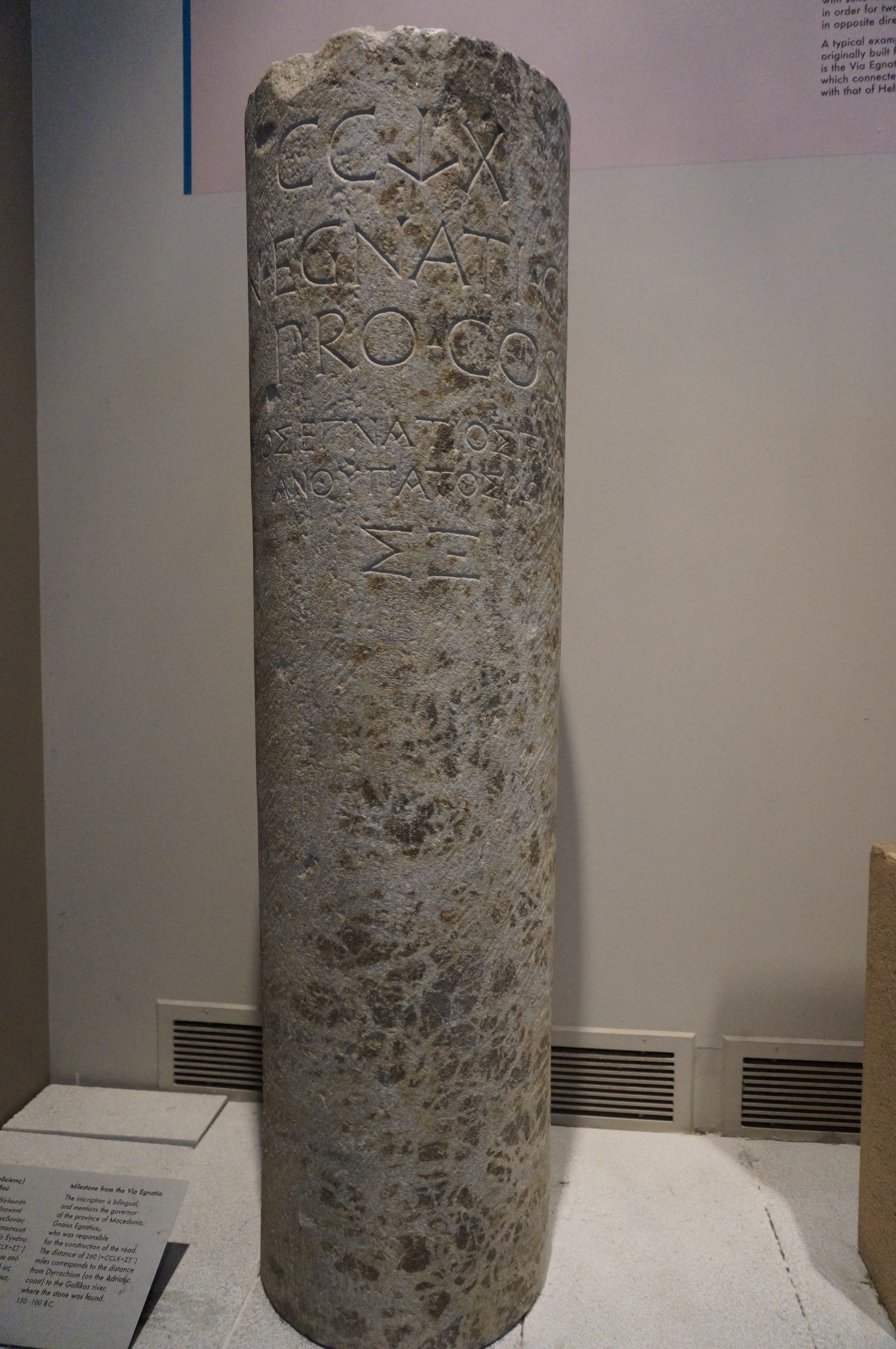 Miliario romano del siglo II a.C. en bilingüe latín-griego, procedente de Tesalónica (Graecia), correspondiente con CIL I 2977 = ILGR 246 = AE 1973, 492 = AE 1976, 643: CCLX / Cn(aeus) Egnati(us) C(ai) f(ilius) / proco(n)s(ul) // "litterae Graecae"